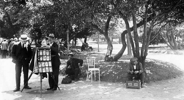 Buenos Aires. Fotógrafos en la Plaza Constitución, 1926. Documento fotográfico. Inventario 161865.